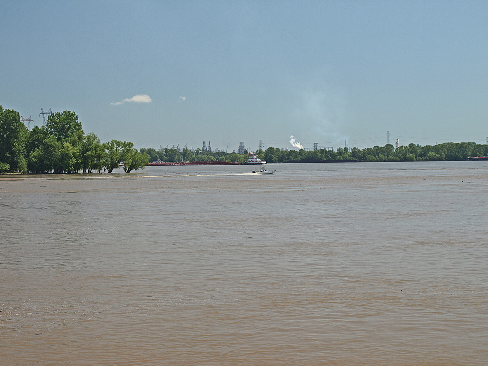 Blick auf die Mündung des Missouri (vorn) in den Mississippi (hinten) von der St. Ferdinand Township, St. Louis County, Missouri aus gesehen